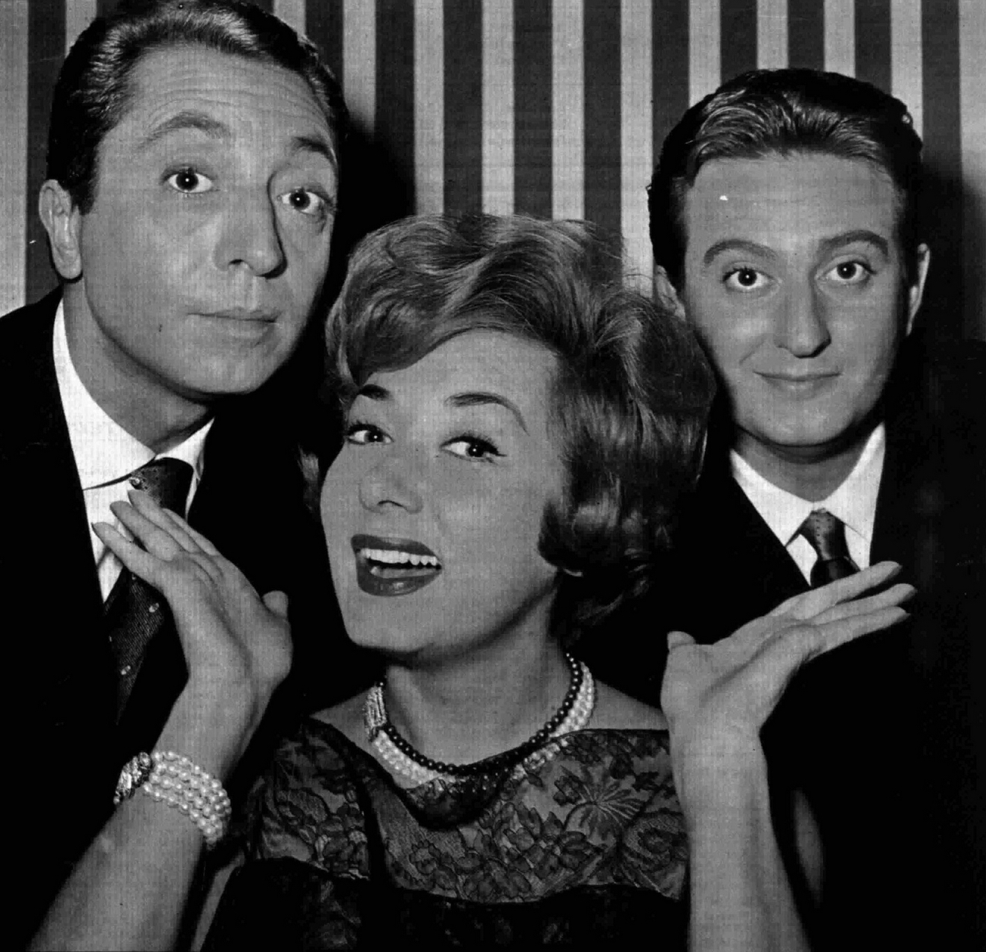 Italian actors Lauretta Masiero, Aroldo Tieri and Alberto Lionello